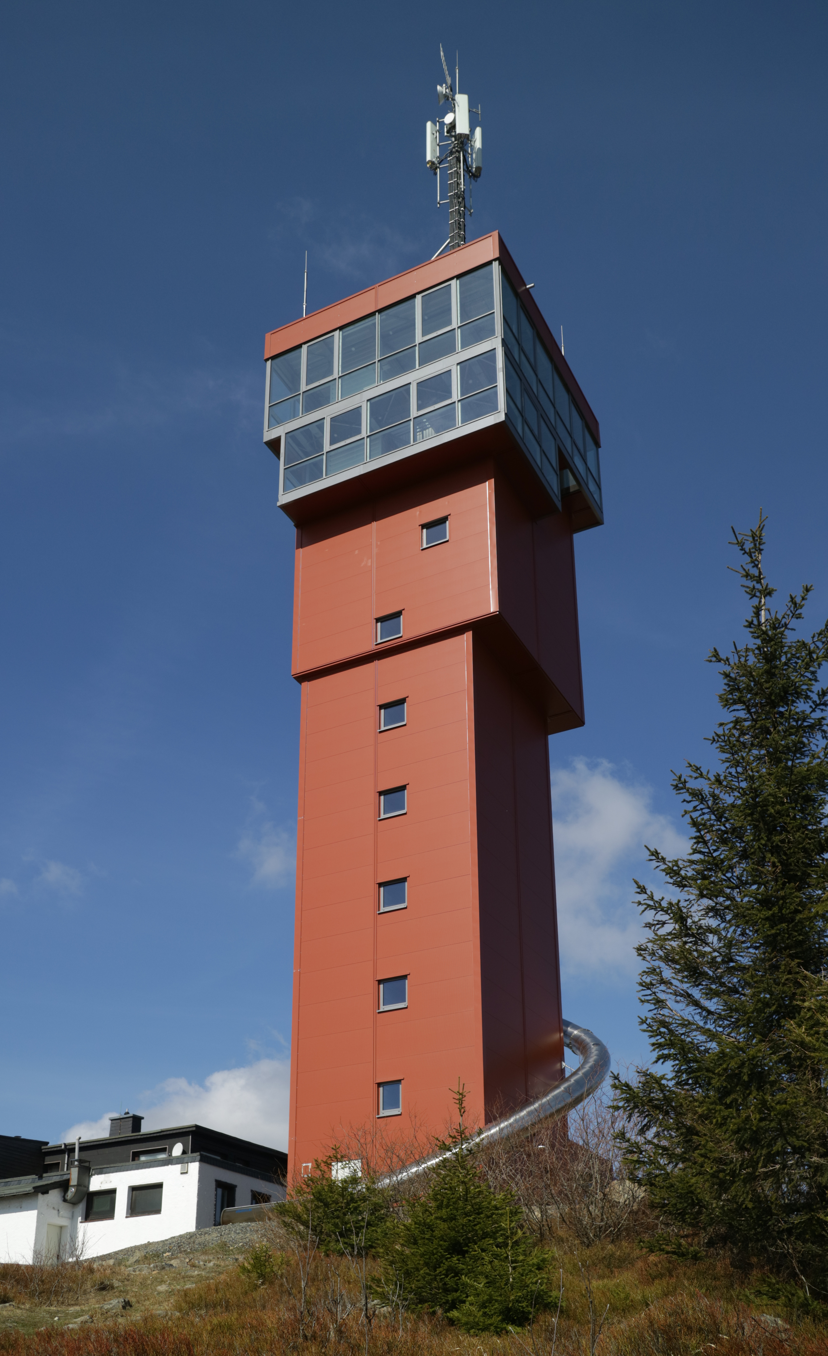 Aussichtsturm auf dem Wurmberg oberhalb von Braunlage in Niedersachsen.Stürzende Linien etwas korrigiert mittels hugin.